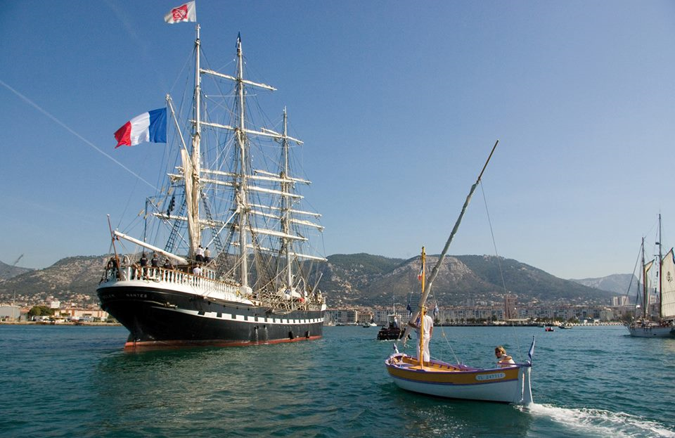 Toulon Voiles de Légende 2013. Le Belem